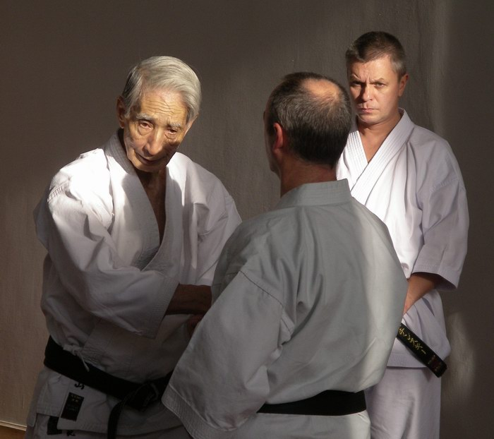 Autorius: Modestas Tursa Fotografuota: 2006 m. gruodžio mėn. 1 d. tarptautinio seminaro Liubline, Lenkijoje metu. Kairėje - Hidetaka Nishiyama. Jam asistuoja - Nelson Carrion bei Wlodzimierz Kwiecinski.